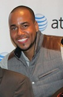 Aventura, agrupación musical dominico-estadounidense.